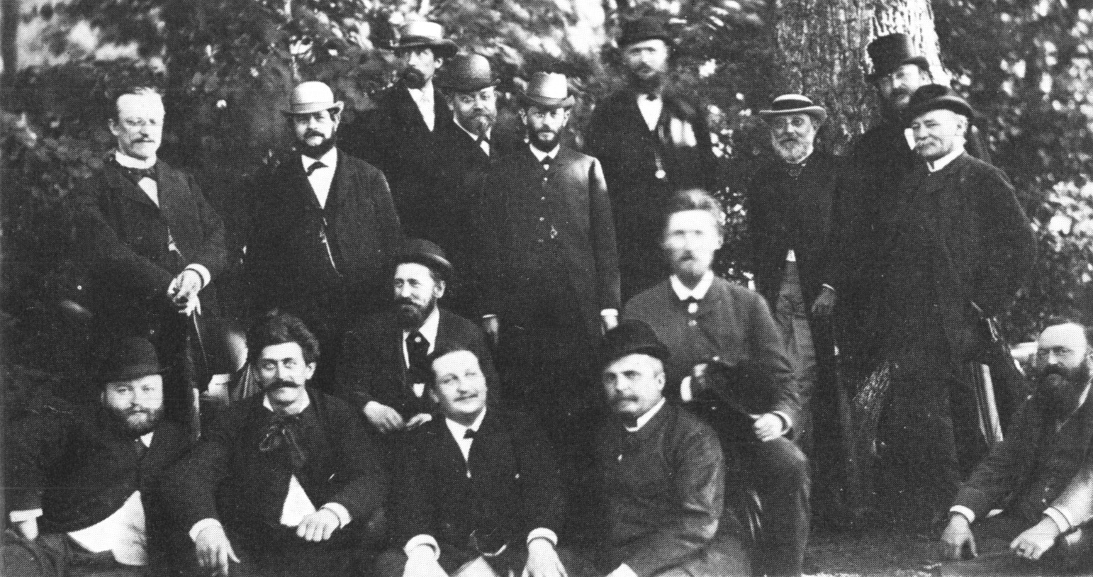 Exkursion der Berliner Gesellschaft für Anthropologie, Ethnologie und Urgeschichte nach Weisdin bei Neustrelitz am 28. Juni 1885 1. Rudolf Virchow, 2. Hans Virchow, 3. Theodor Schlemm, 4. Richard Rohde, 5. Otto Cordel, 6. Albert Voß, 7. Otto Olshausen, 8. Eduard Seler, 9. Eduard Jacobsthal, 10. Eduard Krause, 11. Paul Telge, 12. Carl Künne, 13. Moritz Vater, 14. Herman Sauer